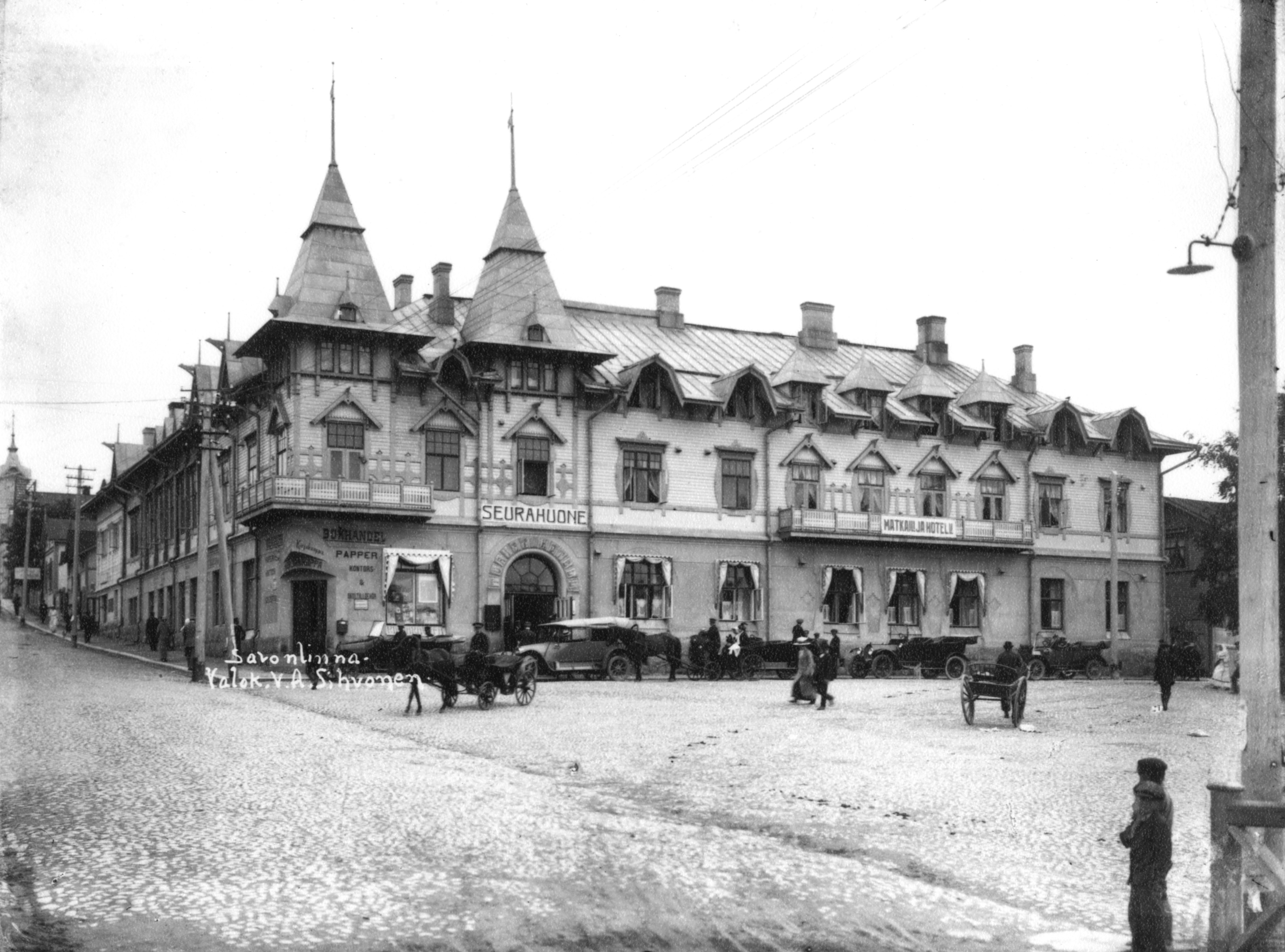 Matkailijahotelli eli Seurahuone kuvattuna Kauppatorilta. Rakennuksen edustalla henkilöautoja ja hevosajoneuvoja. Auvisen rinteessä Raatihuone.